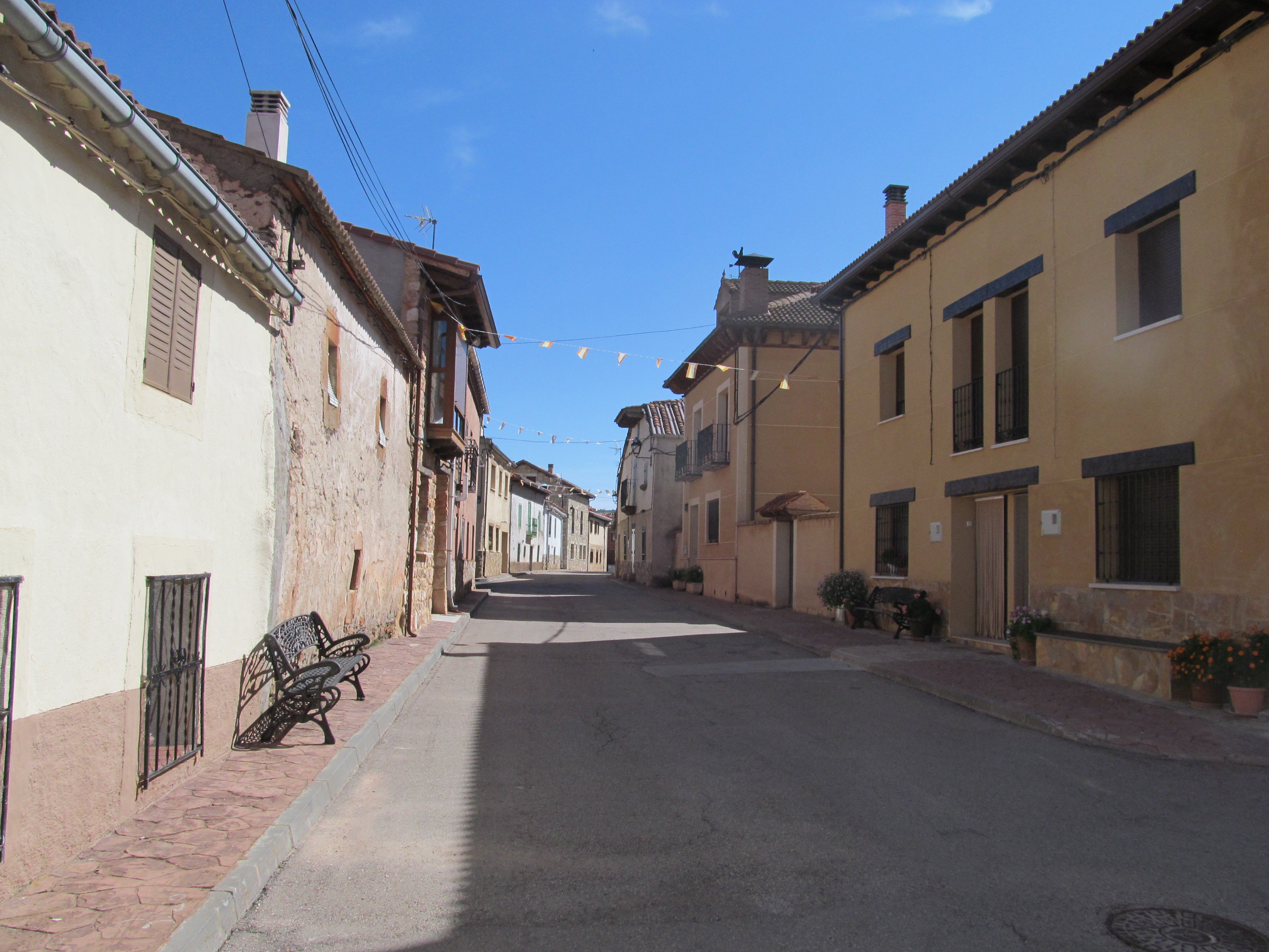 Cantalojas - Calle Mayor, entrada principal.